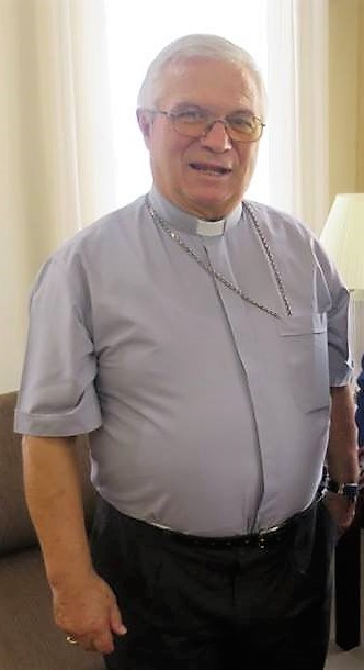 Bispo de Beja Dom António Vitalino Fernandes Dantas